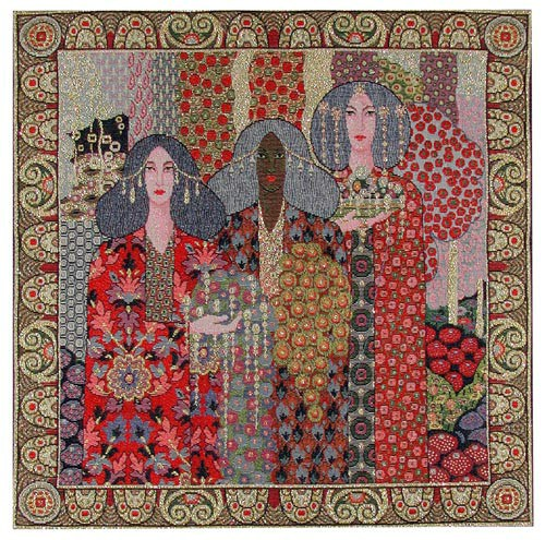 Картины и дизайн итальянского художника Витторио Цеккин (1878-1947)